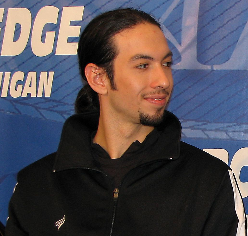 figure skater Ben Agosto